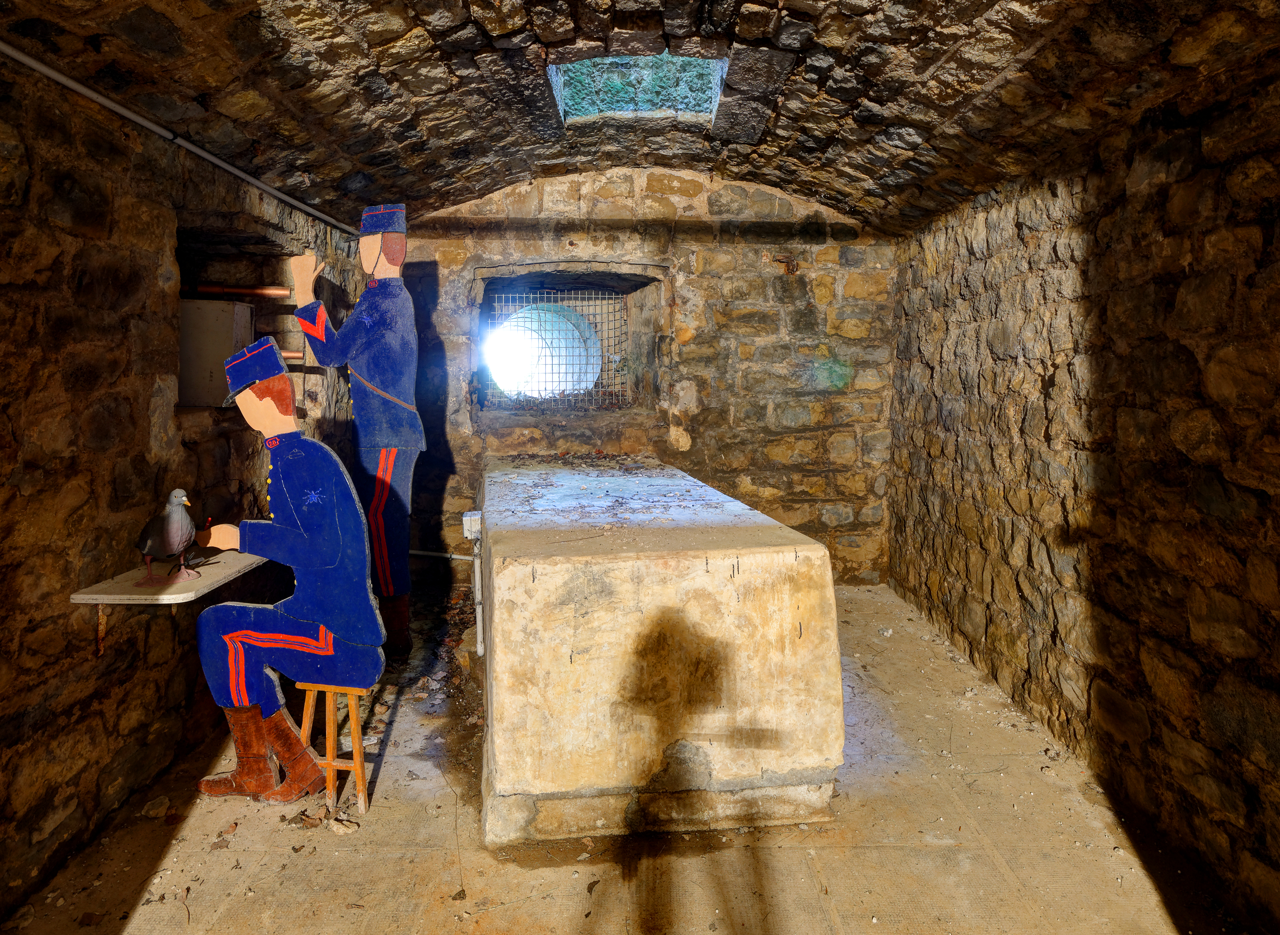 Fort du Mont Bart : casemate optique Sud (HDR).